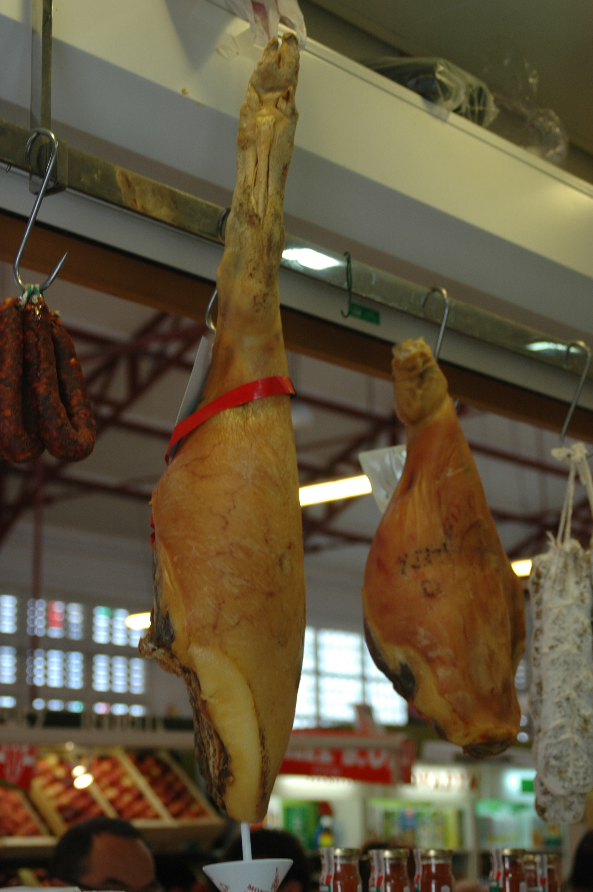 Marché de Biarritz, jambon. Photo prise le 06/08/06 par Harrieta171